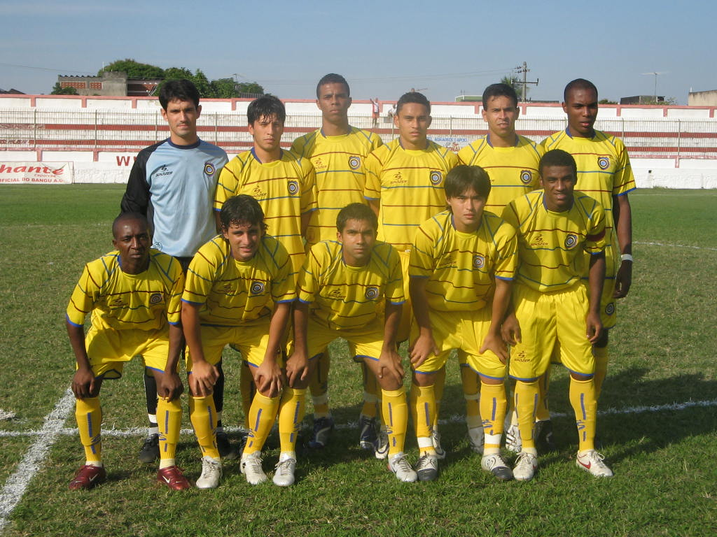 Formação profissional do Madureira Esporte Clube, em 2007. Foto de Paulo Roberto Rodrigues.